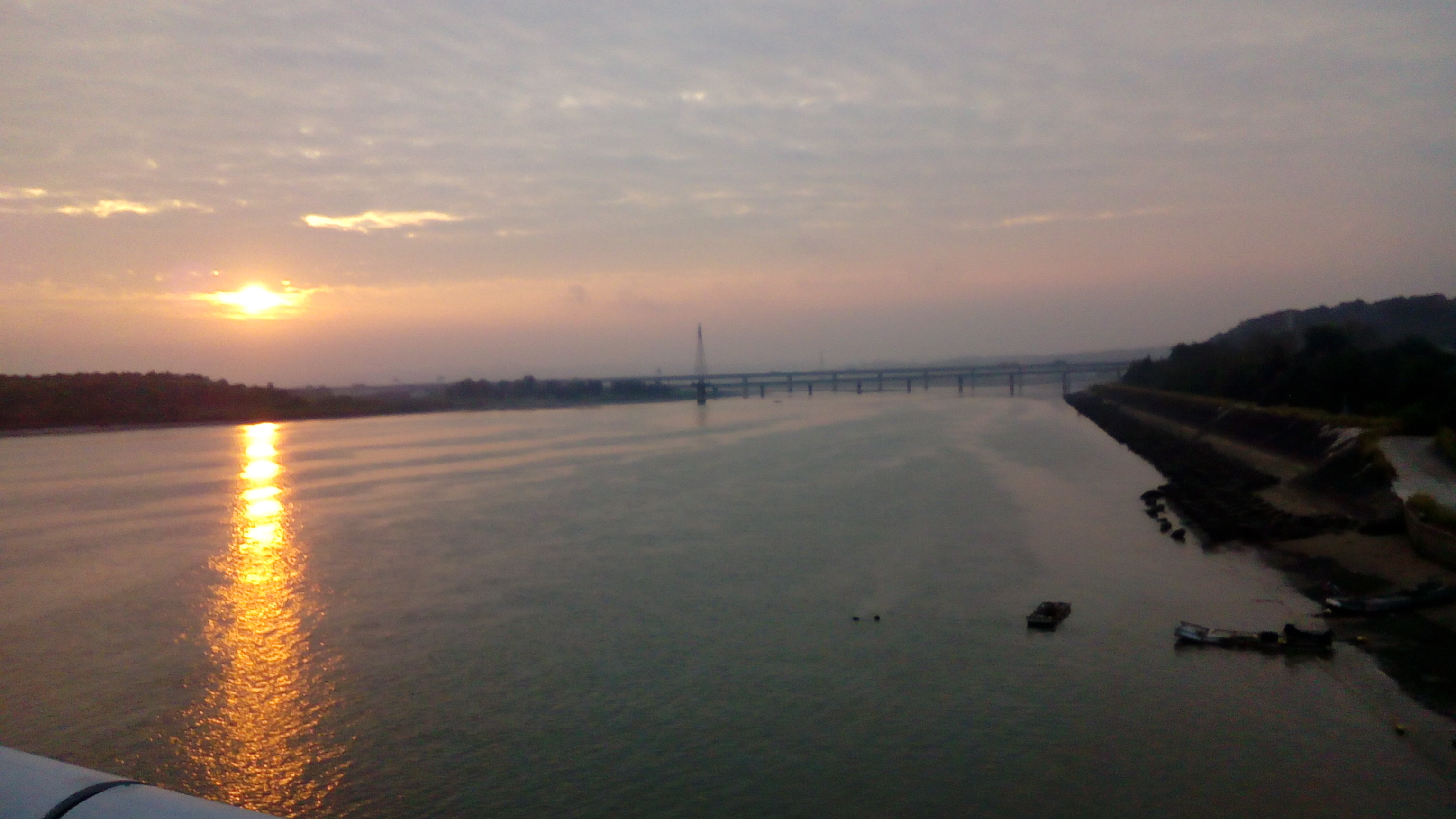 清晨六時許的中港溪後龍段